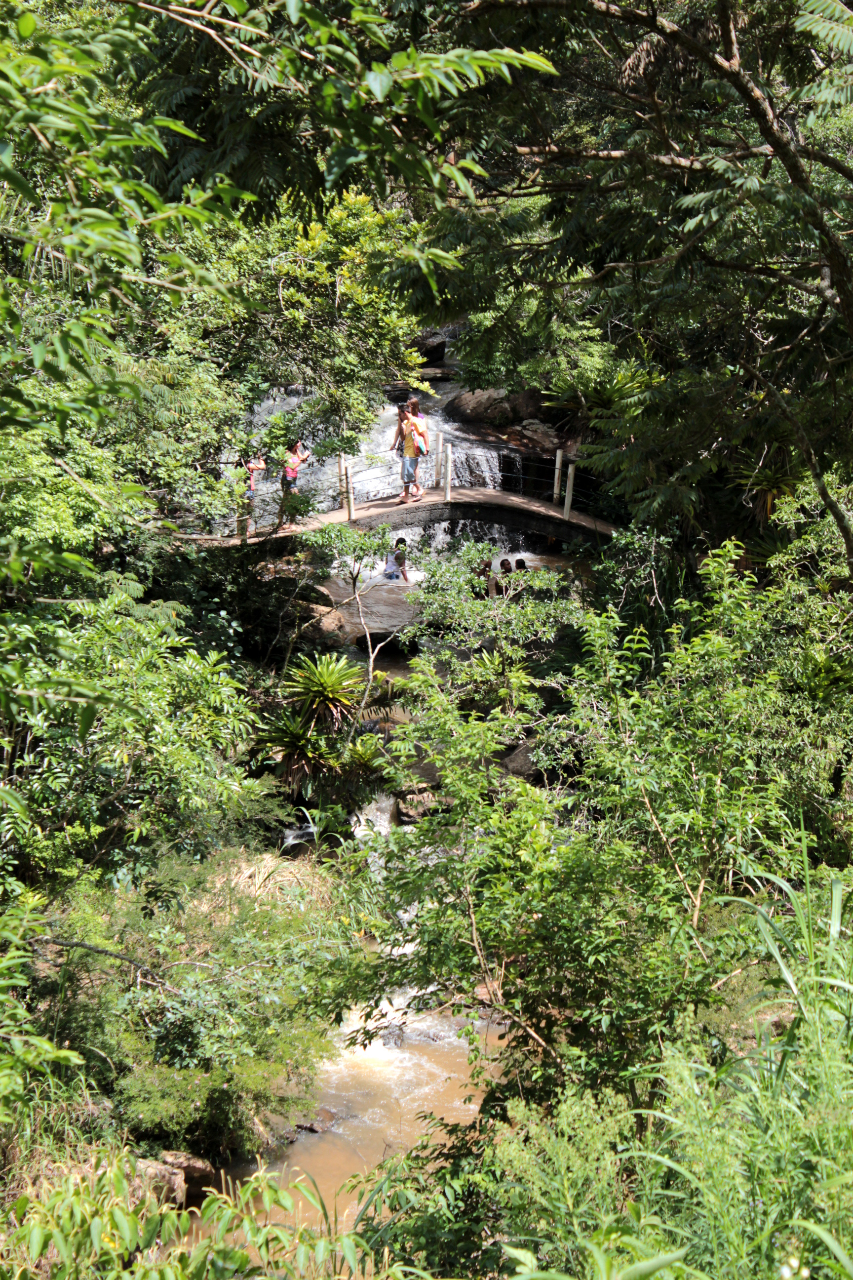 Uma das quedas da cachoeira Ninho da Águia, localizada a beira da rodovia MG-350, entre Itajubá e Delfim Moreira - MG.